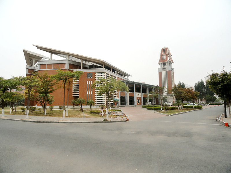 2013年1月23日拍摄的集美大学月明楼